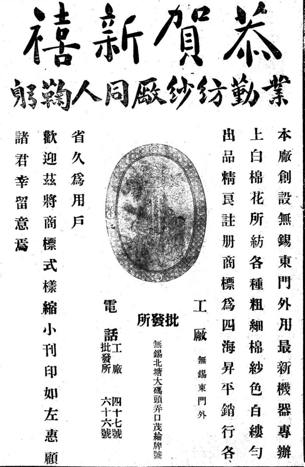 题名： 恭賀新禧 广告发布者： 業勤纺纱厰 文献来源： 无锡新报 出版时间： 1924年1月1日 附属报名： 元旦增刊